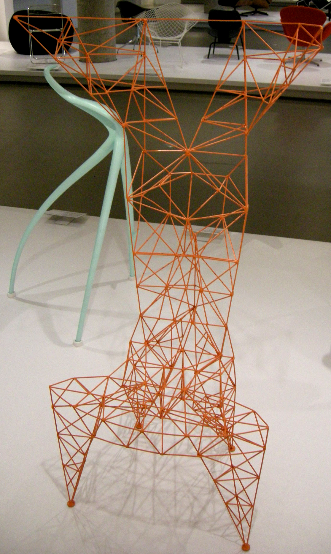 Ngv design, tom dixon, pylon chair, 1991